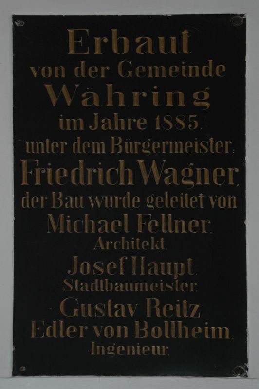 Gedenktafel zur Errichtung des Schulgebäudes in der Schopenhauerstraße 49 im Schopenhauer Realgymnasium